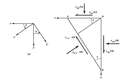 pemodelan stress 2d